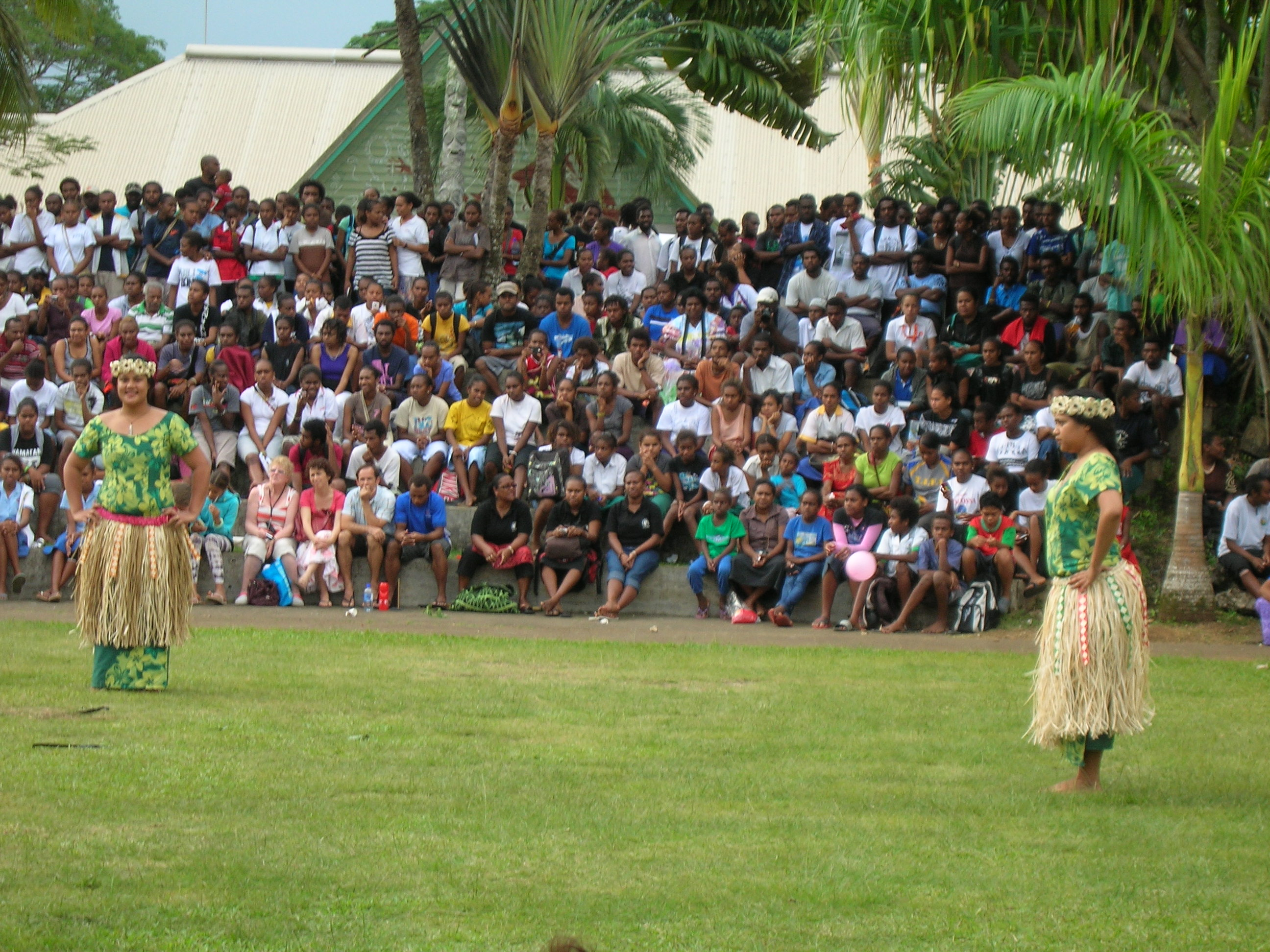 Tokelau dancers